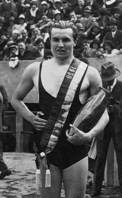 Les Tourelles : France-Hongrie : Barany (en pied) : [photographie de presse] / Agence Meurisse